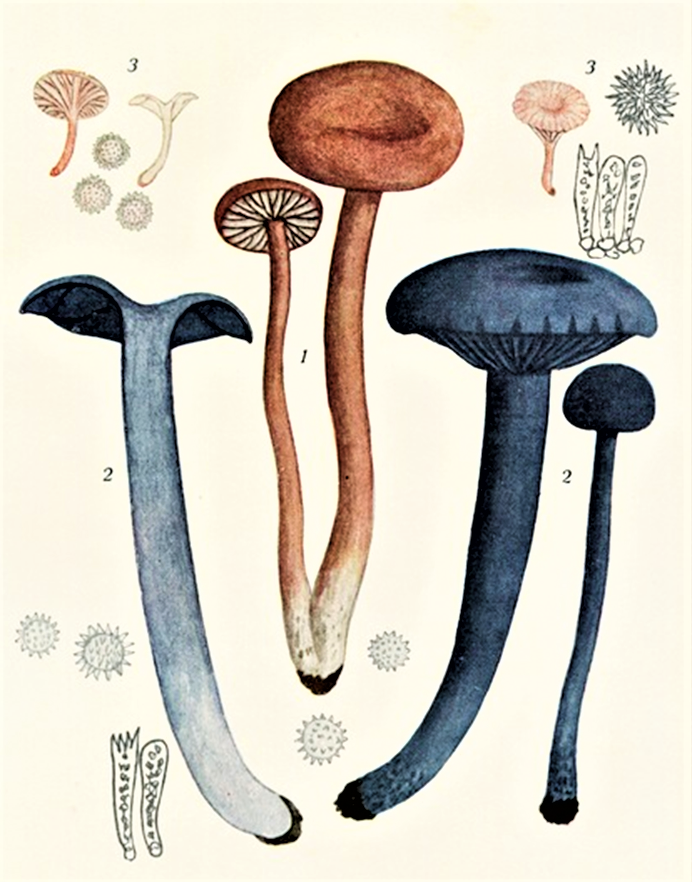 Giacomo Bresadola: Bild 1: Clytocybe laccata (Scop., 1772) P.Kumm. (1871), heute Laccaria laccata (Scop.) Cooke (1884) Bild 2: Clytocybe amethystina (Scop., 1778) Peck (1897), heute Laccaria amethystina Cooke (1884) Bild 3: Clytocybe tortulis Bolton (1788), heute Laccaria tortilis (Bolton) Cooke (1884)